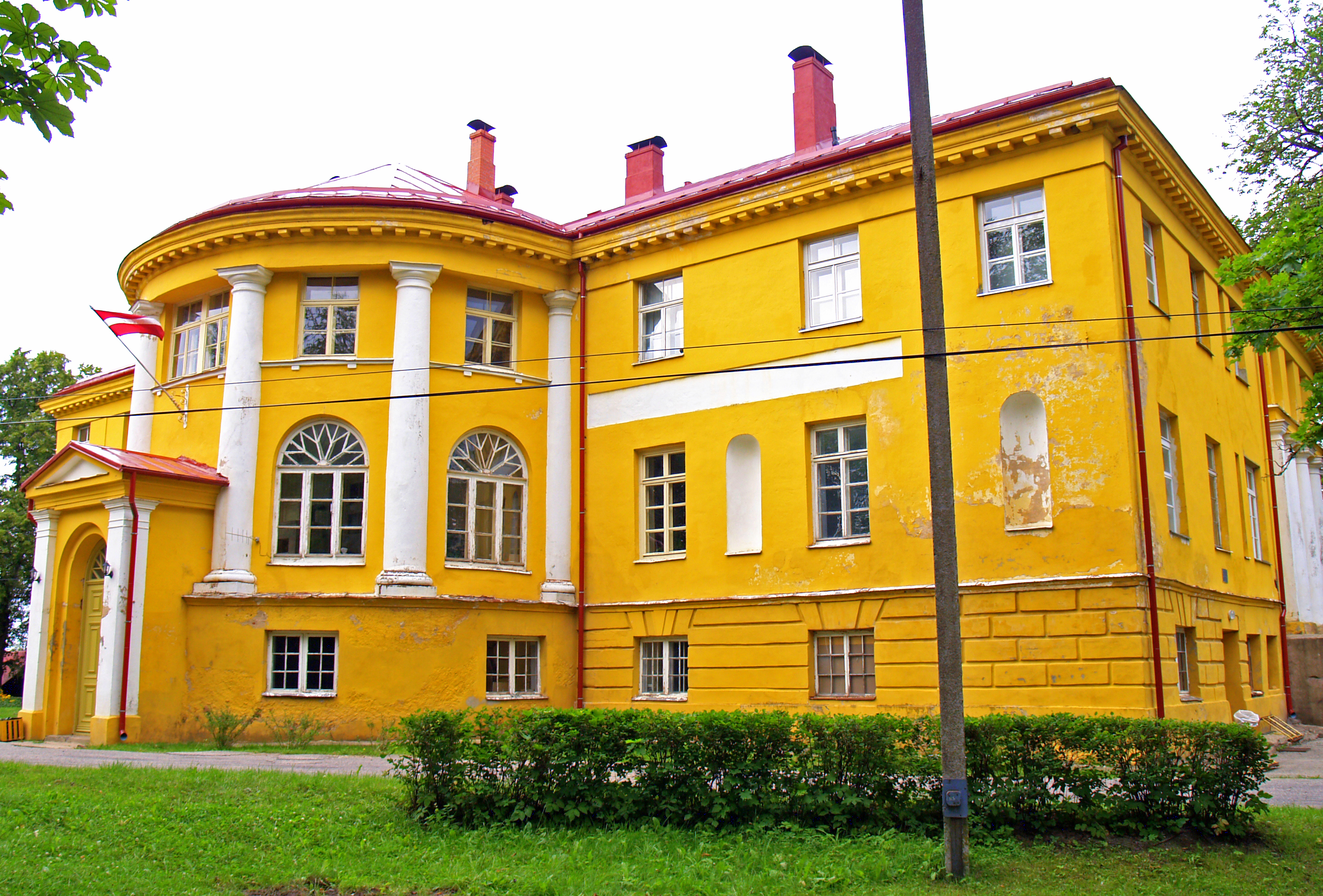 Tiņģeres pils (Tingere Castle)